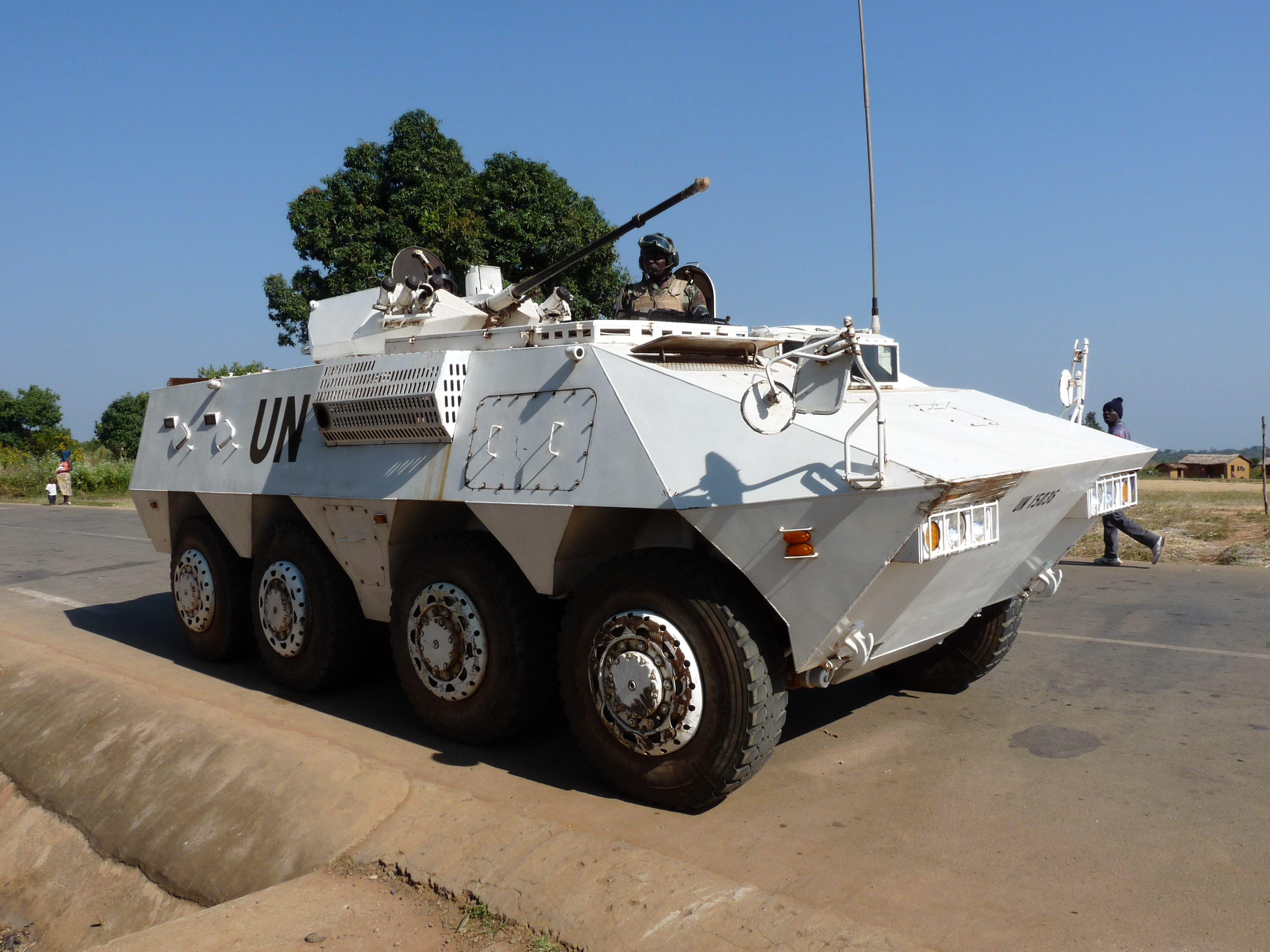 Véhicule blindé de l'Organisation des Nations Unies.